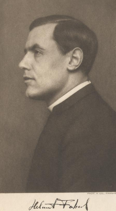 Helmut Fahsel, deutscher kath. Priester, Buchautor und Vortragsredner, Gegner des NS-Regimes